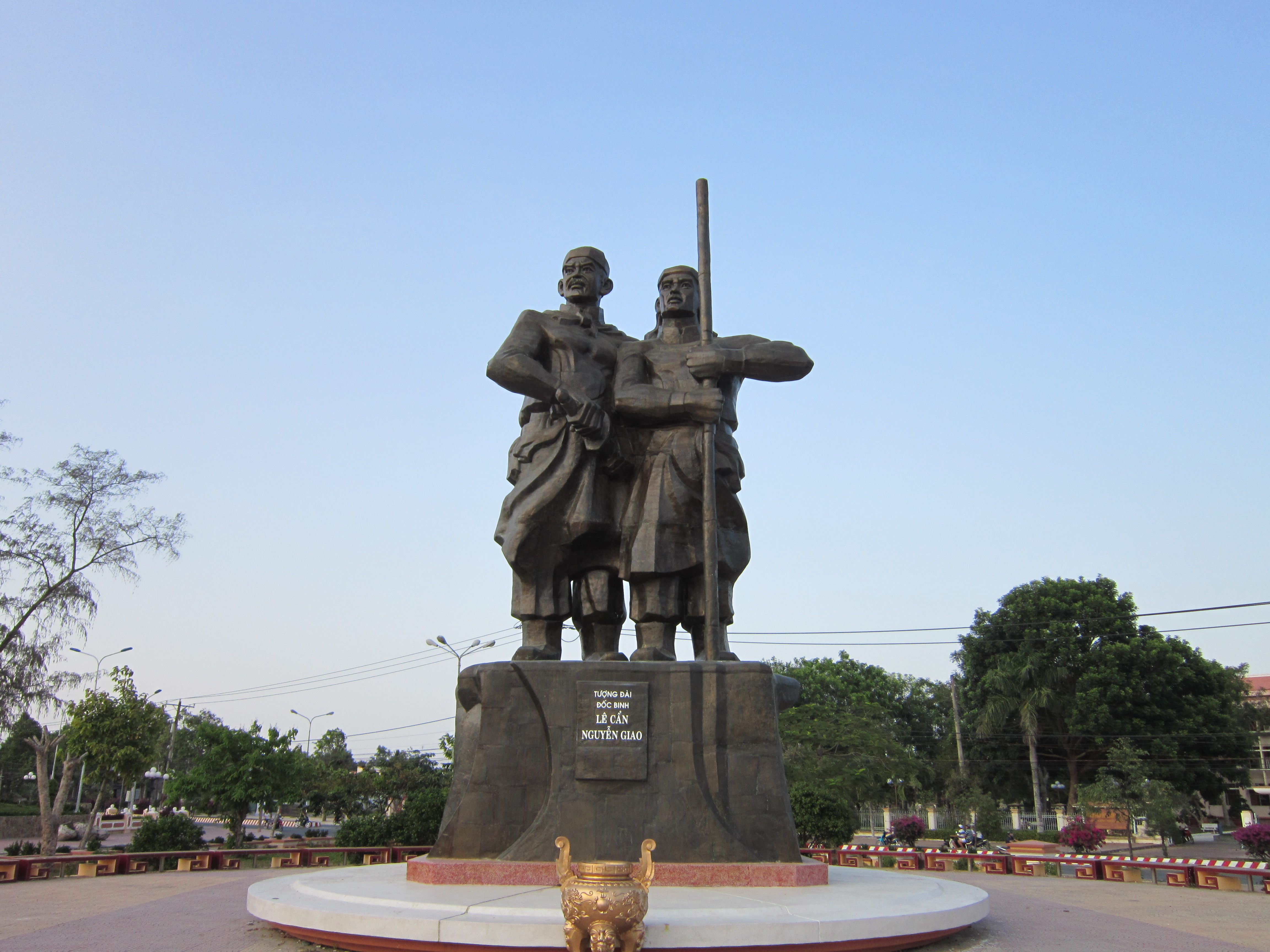 Tượng đài Đốc binh Lê Cẩn-Nguyễn Giao tại ngã ba An Nhơn, thị trấn Vũng Liêm, huyện Vũng Liêm, tỉnh Vĩnh Long, Việt Nam.